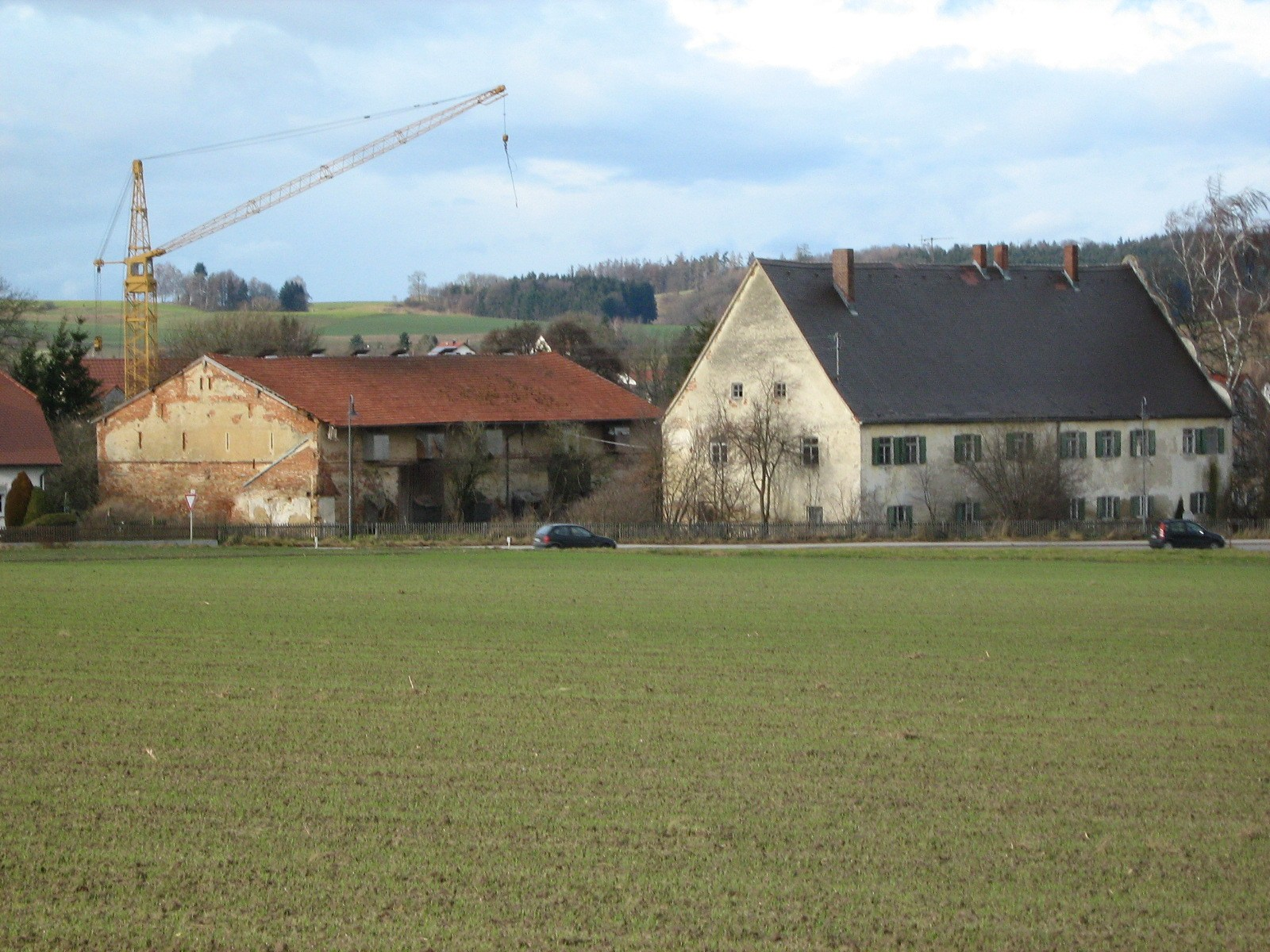 Schlossgut Iglhof (ehem. Schlossgut) in Affing-Iglbach; Das Wirtschaftsgebäude wurde 2007 abgerissen.